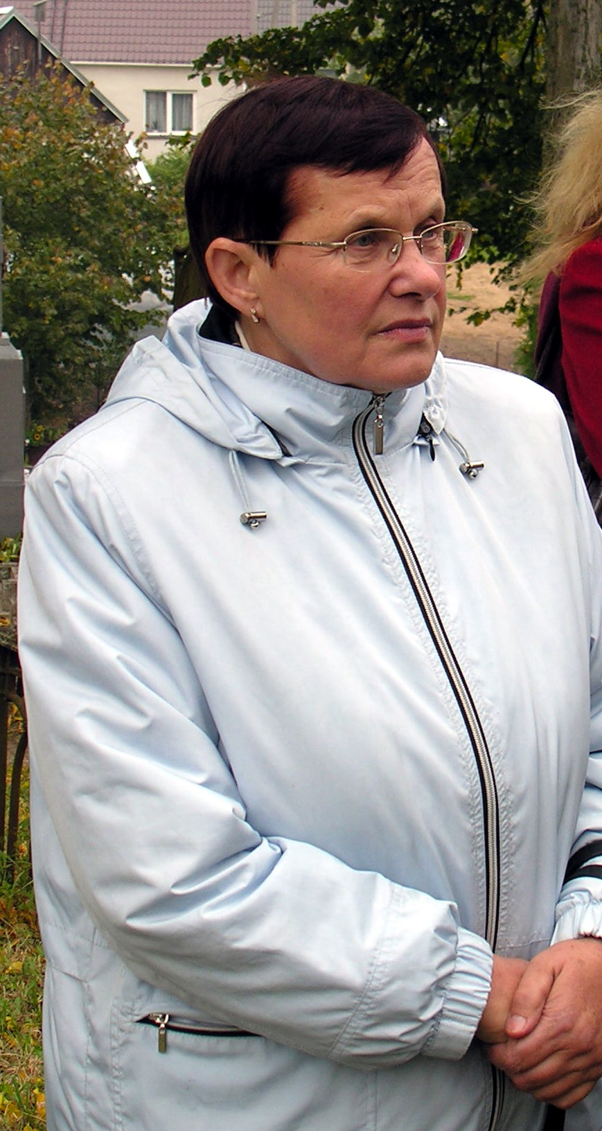 Viktorija Daujotytė-Pakerienė, Lithuanian literary critic